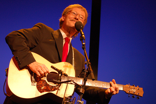 Øystein Sunde. Fra forestillingen "Sånn er'e bare" på Dizzie showteater i Oslo lørdag 21. april 2007, klokken 1630.